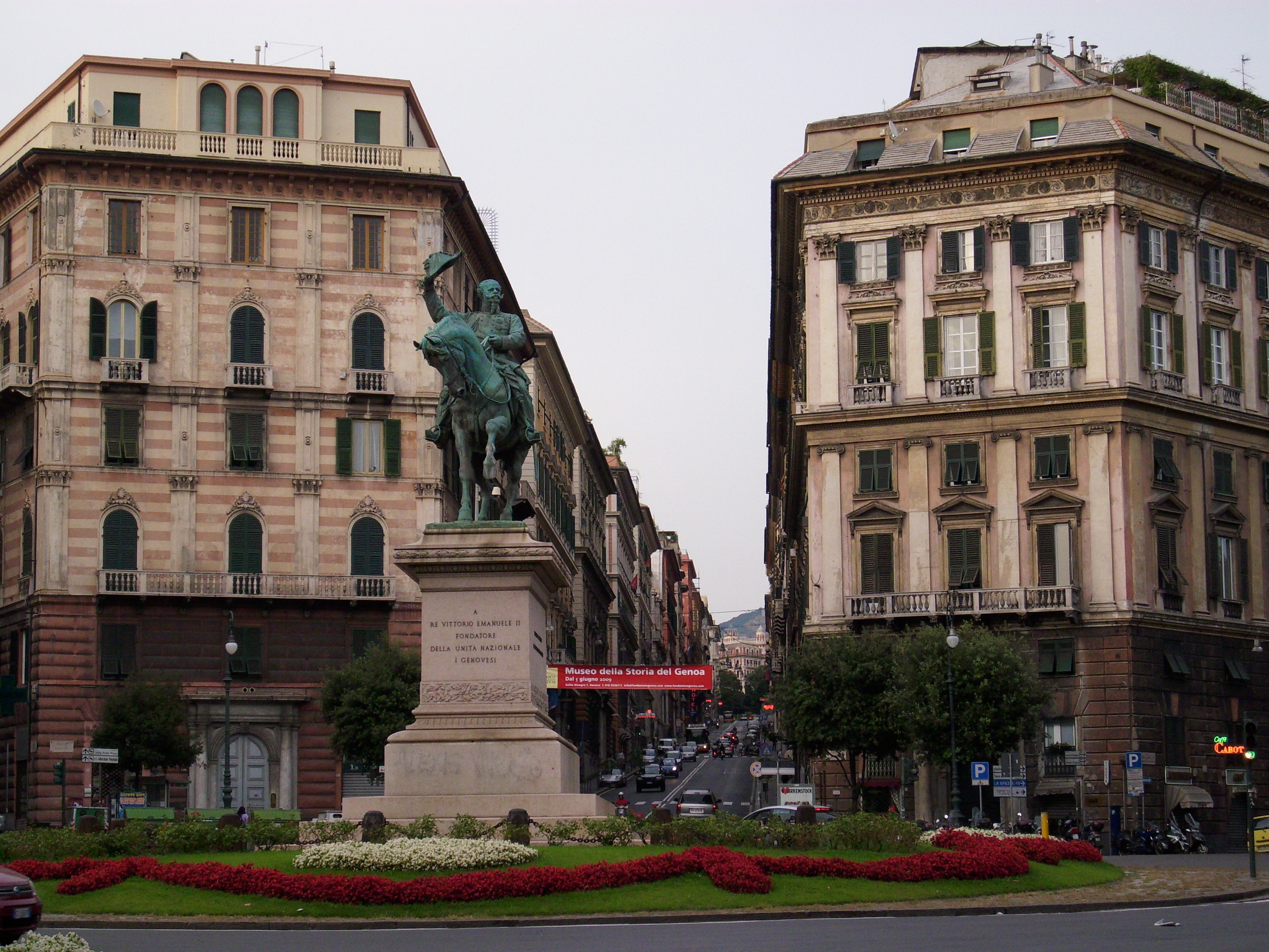 La statua di statua a Vittorio Emanuele II in piazza Corvetto e dietro a questa via Assarotti